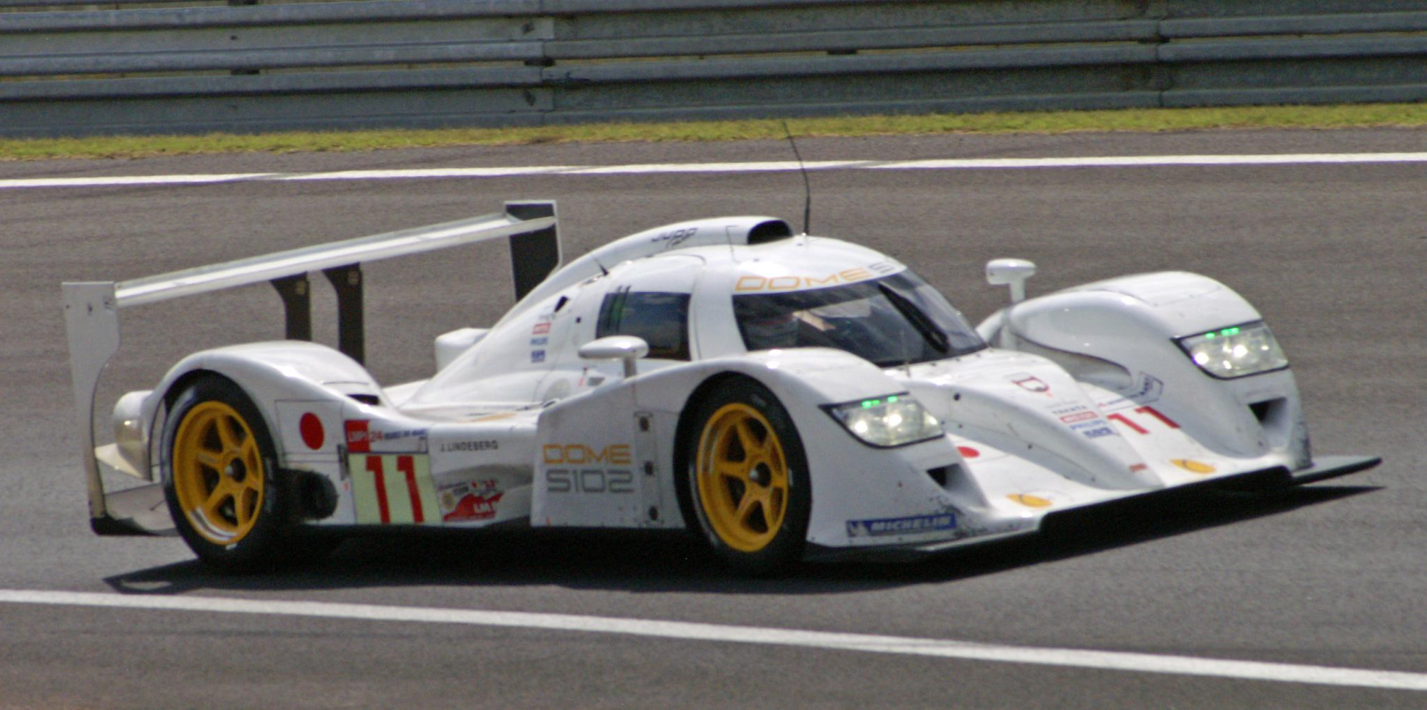 Le Mans 24 Hours 2008